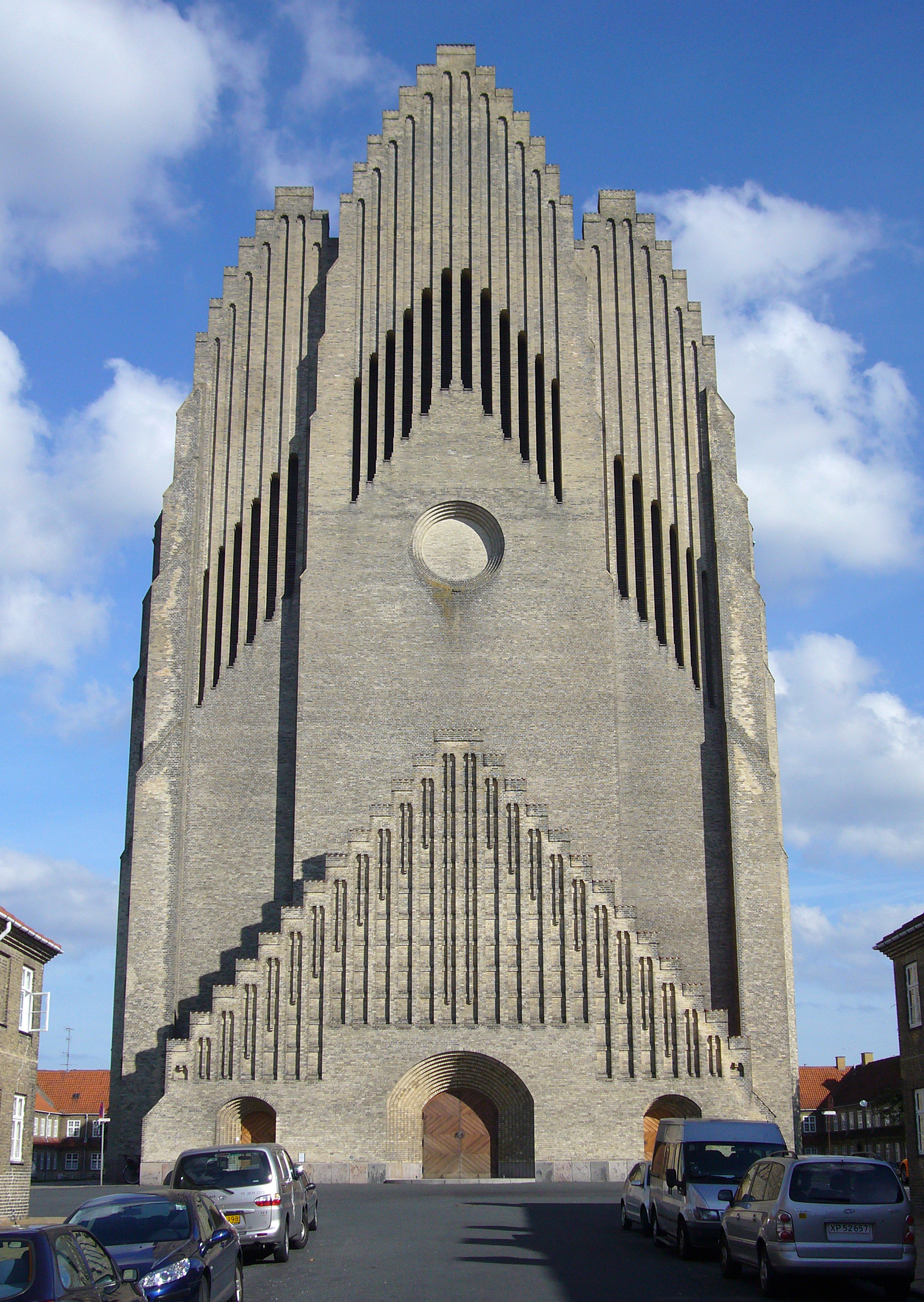 Grundtvigs Kirke, Copenhagen, Denmark. Grundtvigs Kirke